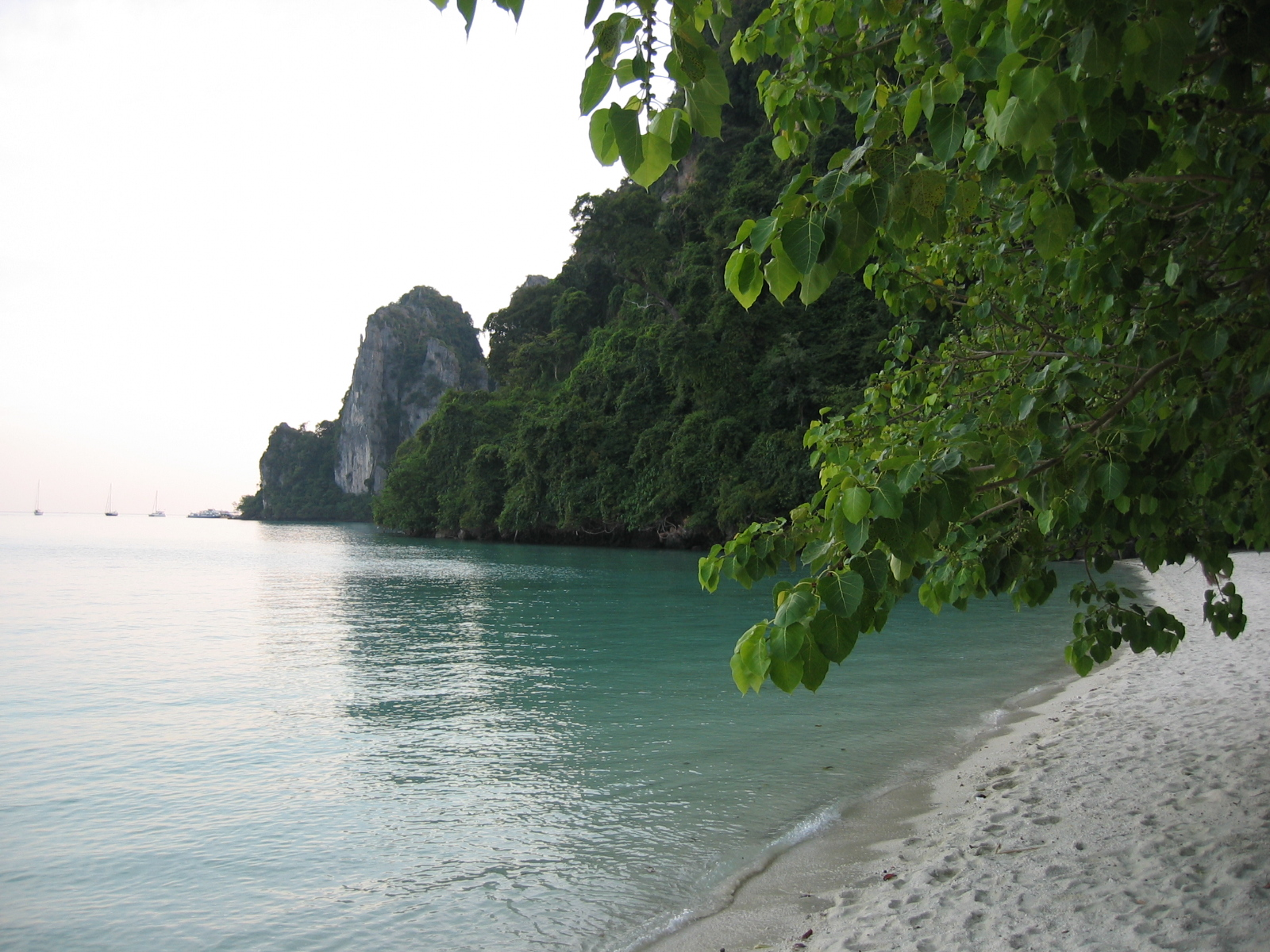 En av de större stränderna på Koh Phi Phi Don.